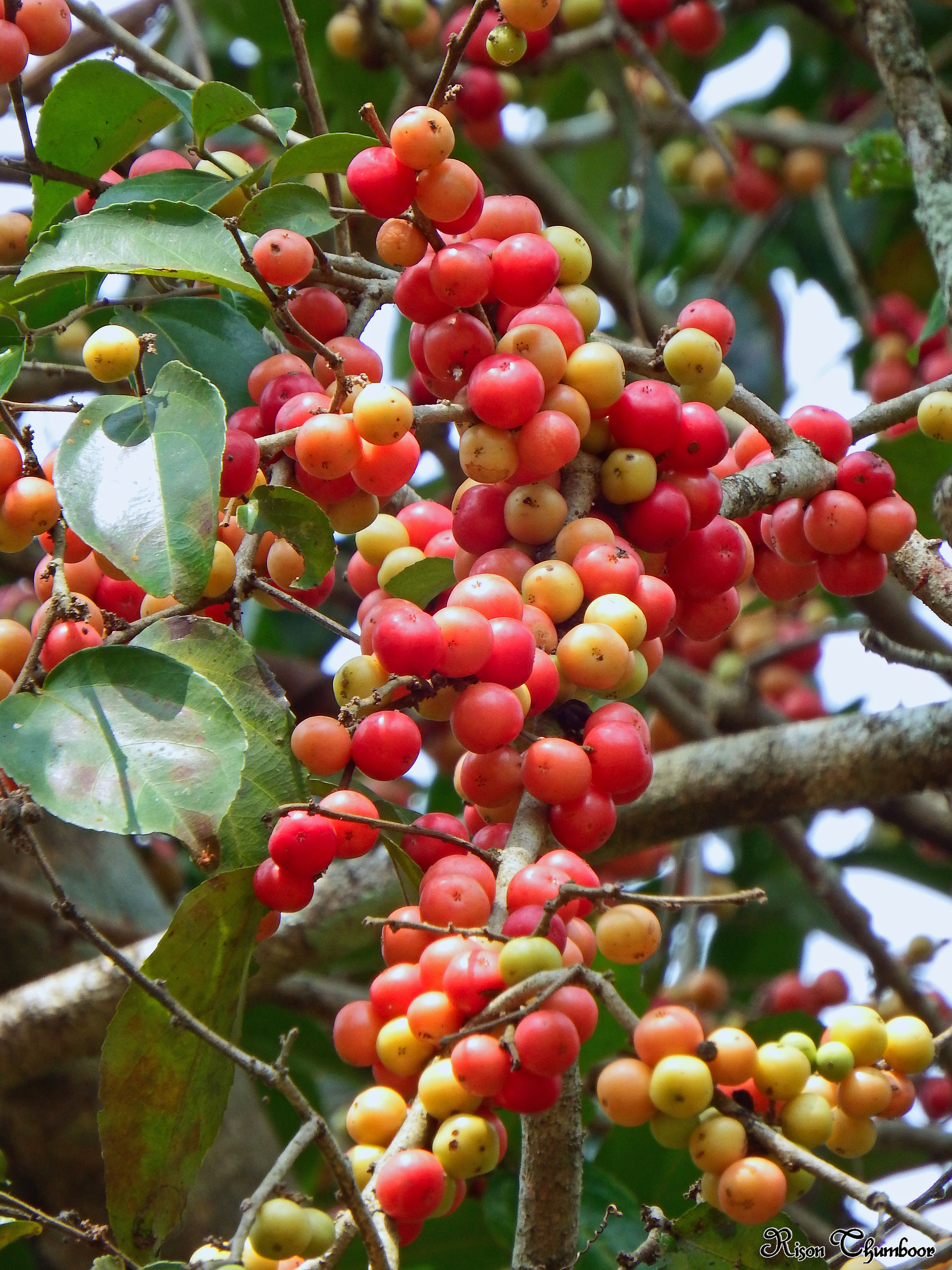 10 മീറ്ററോളം ഉയരം വരുന്ന ഒരു ഇടത്തരം വൃക്ഷം. മൂപ്പെത്താത്ത ശിഖരങ്ങളിൽ നിറയെ മുള്ളൂകളുണ്ടാകും.മാർച്ച്‌ ,ഏപ്രിൽ മാസങ്ങളിൽ നിറയെ ചുവന്നു തുടുത്ത പഴങ്ങളുണ്ടാകും. മധുരവും ചവർപ്പും കലർന്ന ഈ പഴങ്ങൾ ഭക്ഷ്യയോഗ്യമാണ്. വയങ്കതൻ (Rustic), പുലിത്തെയ്യൻ (Common Leopard) എന്നീ ശലഭങ്ങളുടെ ആഹാര സസ്യം കൂടിയാണിത്.